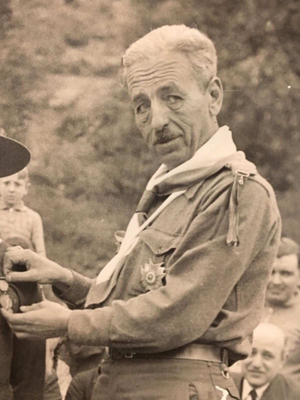 Carlos Cifuentes Rodríguez, Exploradores de España en Barcelona (1929)